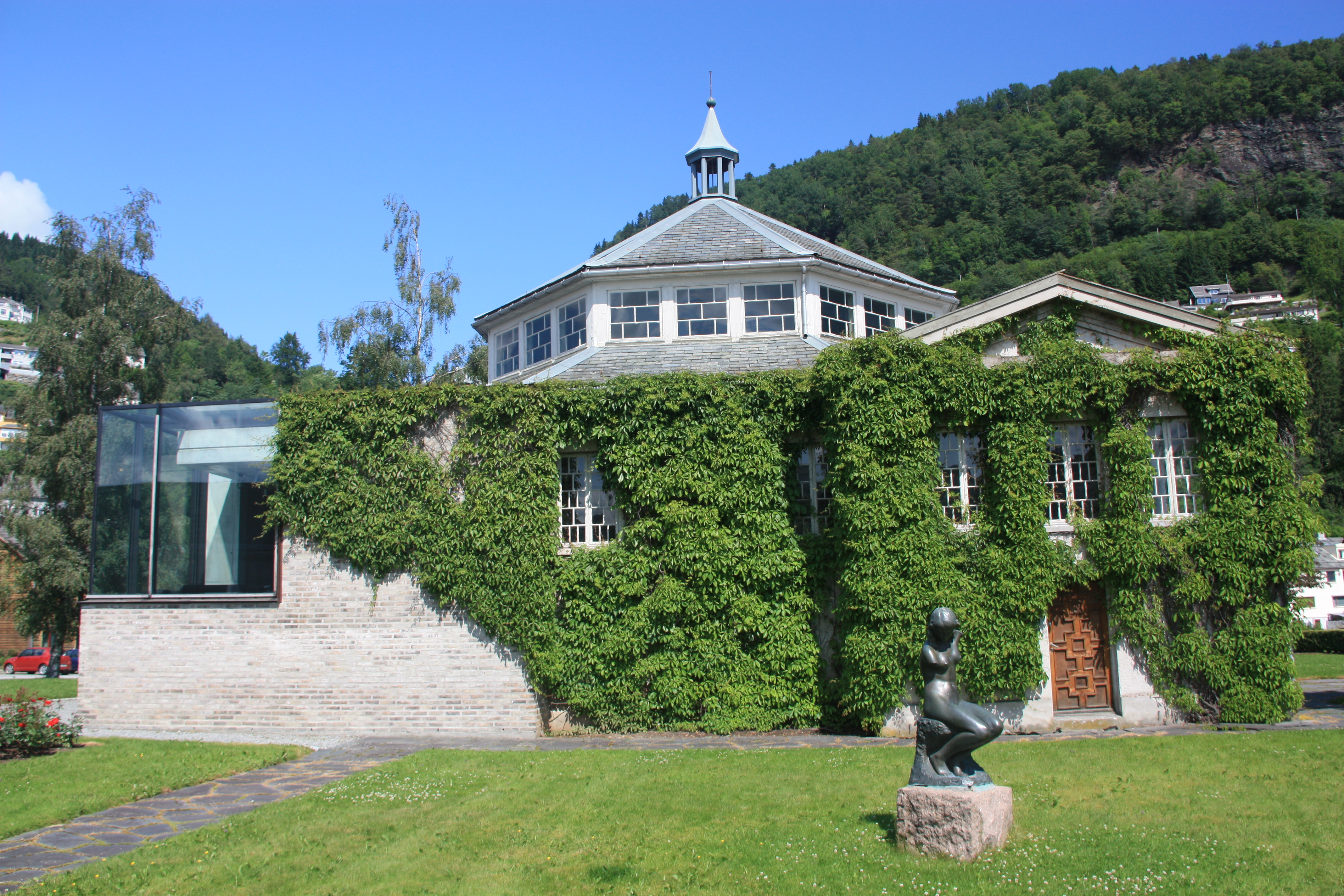 Museumsbygg for Ingebrigt Vik (1867 - 1927) ferdig 1934 arkitekt: Torgeir Alvsaker Unknown